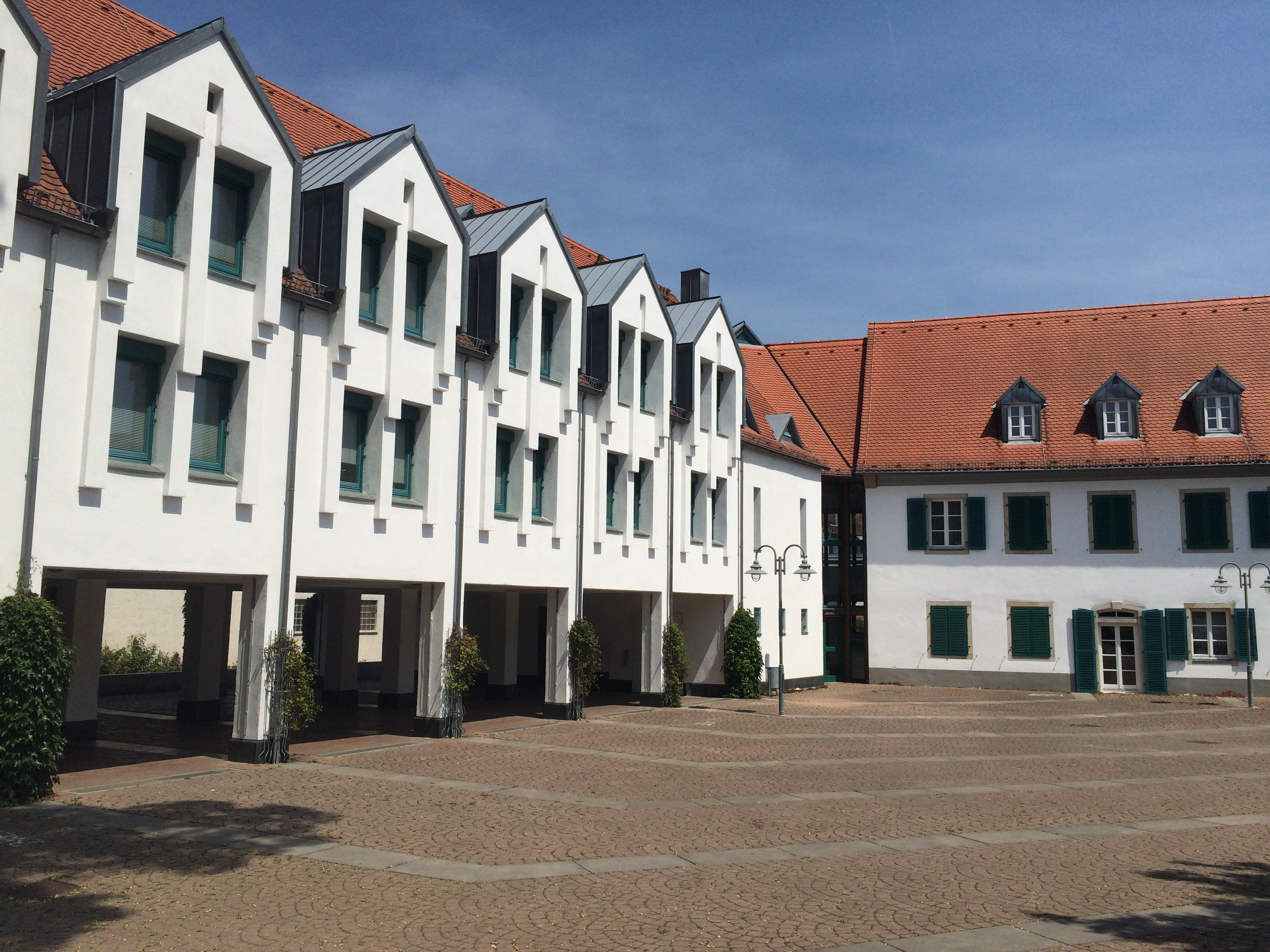 Verwaltung Verbandsgemeinde Bodenheim Innenhof